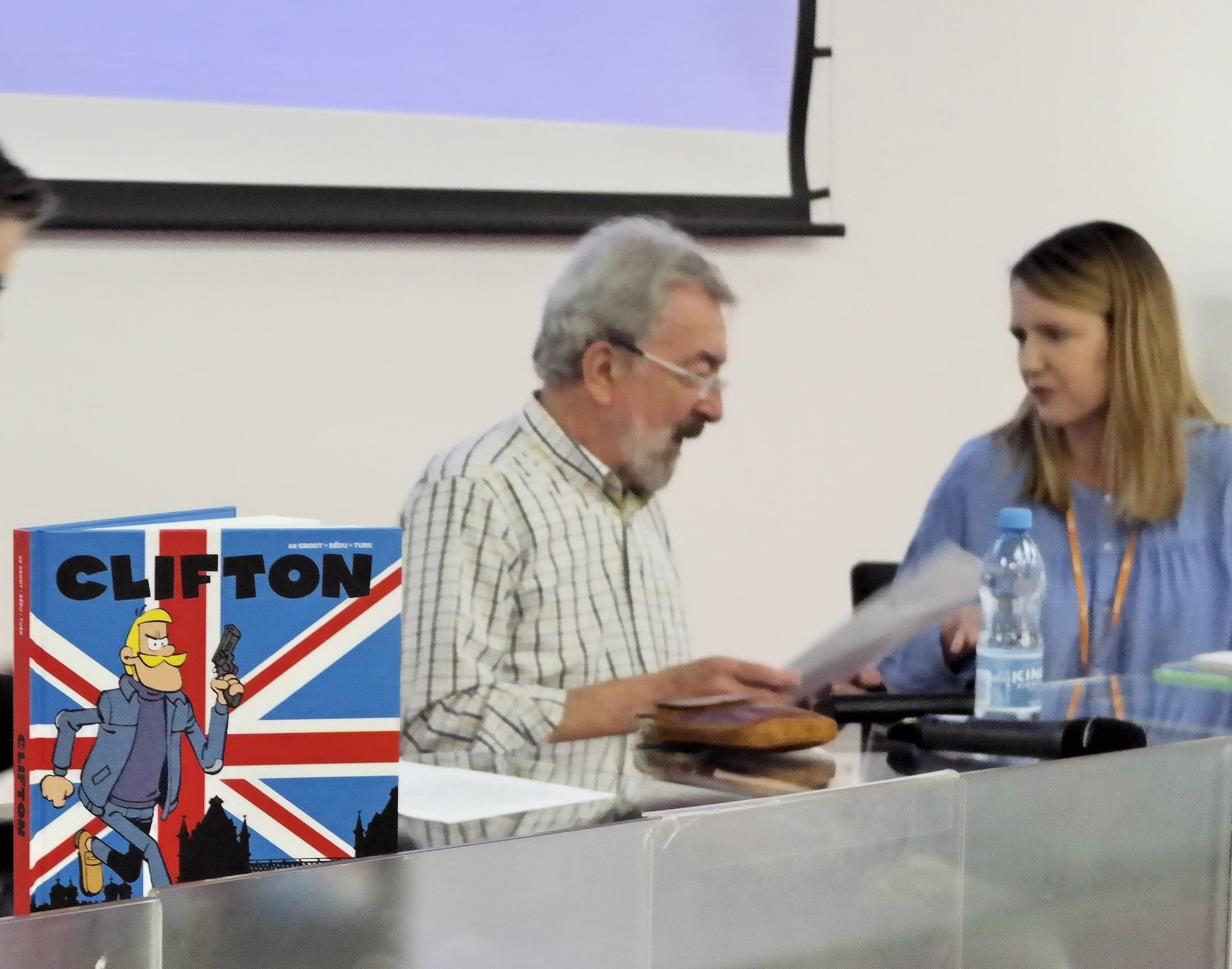 Bernard "Bedu" Dumont, Pyrkon, Poznań